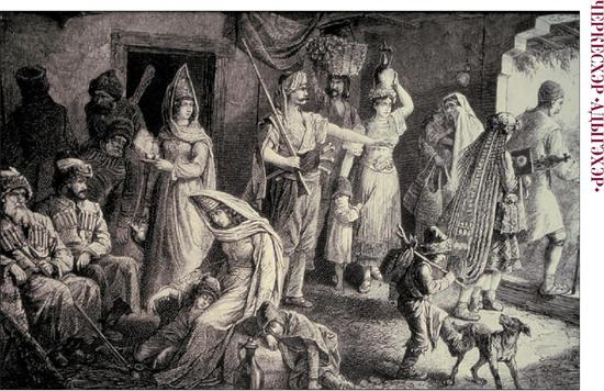 Турецкие янычары, заселяющие адыгов в дома изгоняемых болгар. Рисунок Ф. Канитца, 1875. Из книги Б. Едиджа "Черкесы-адыги в рисунках европейских художников XVII-XIX веков". Майкоп, 2009.